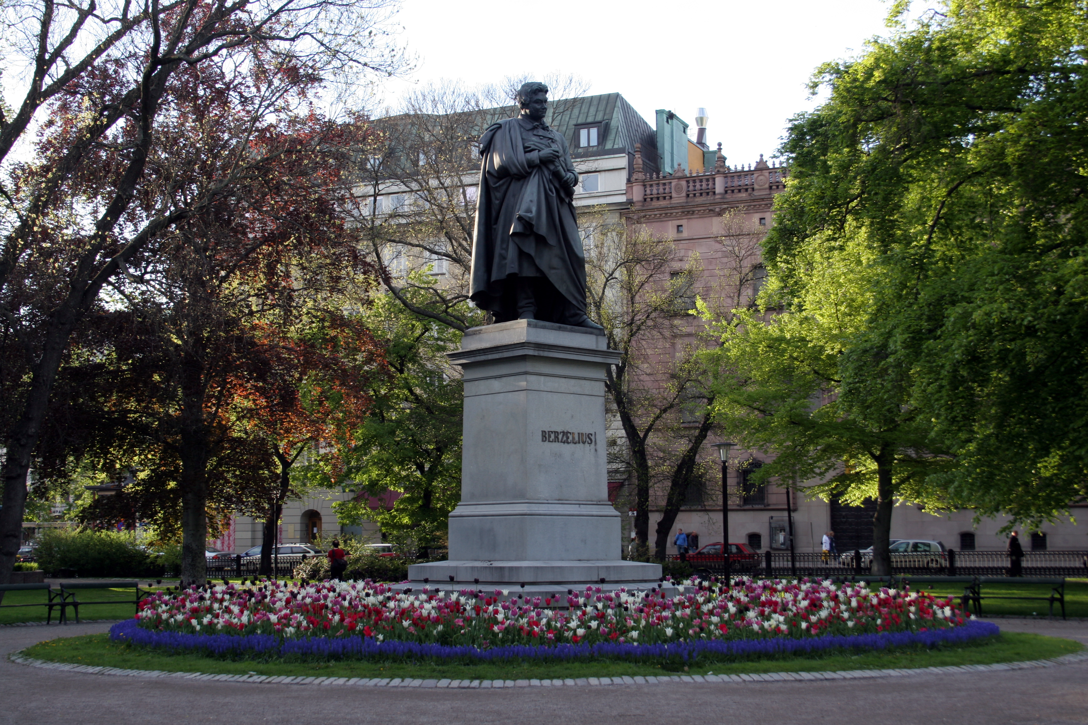 Jöns Jacob Berzelius at Berzelii park, Stockholm, Sweden.